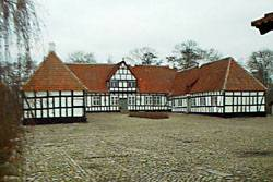 Dybvad, gård i Gosmer Sogn, Århus Kommune